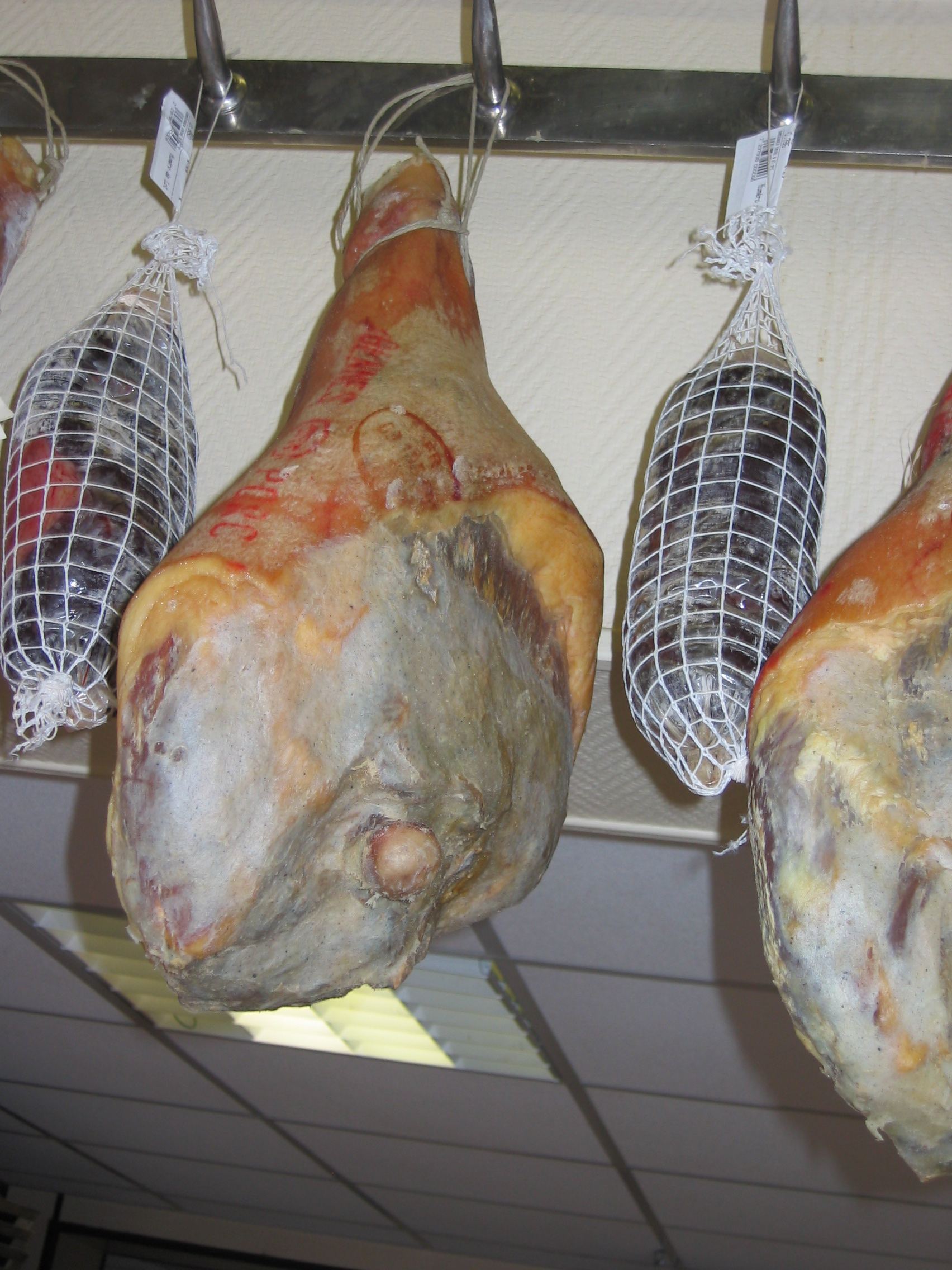 Jambon sec d'Ardennes France vue